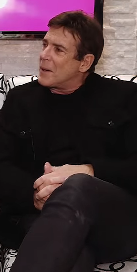 Entrevista a Carlos Mata.